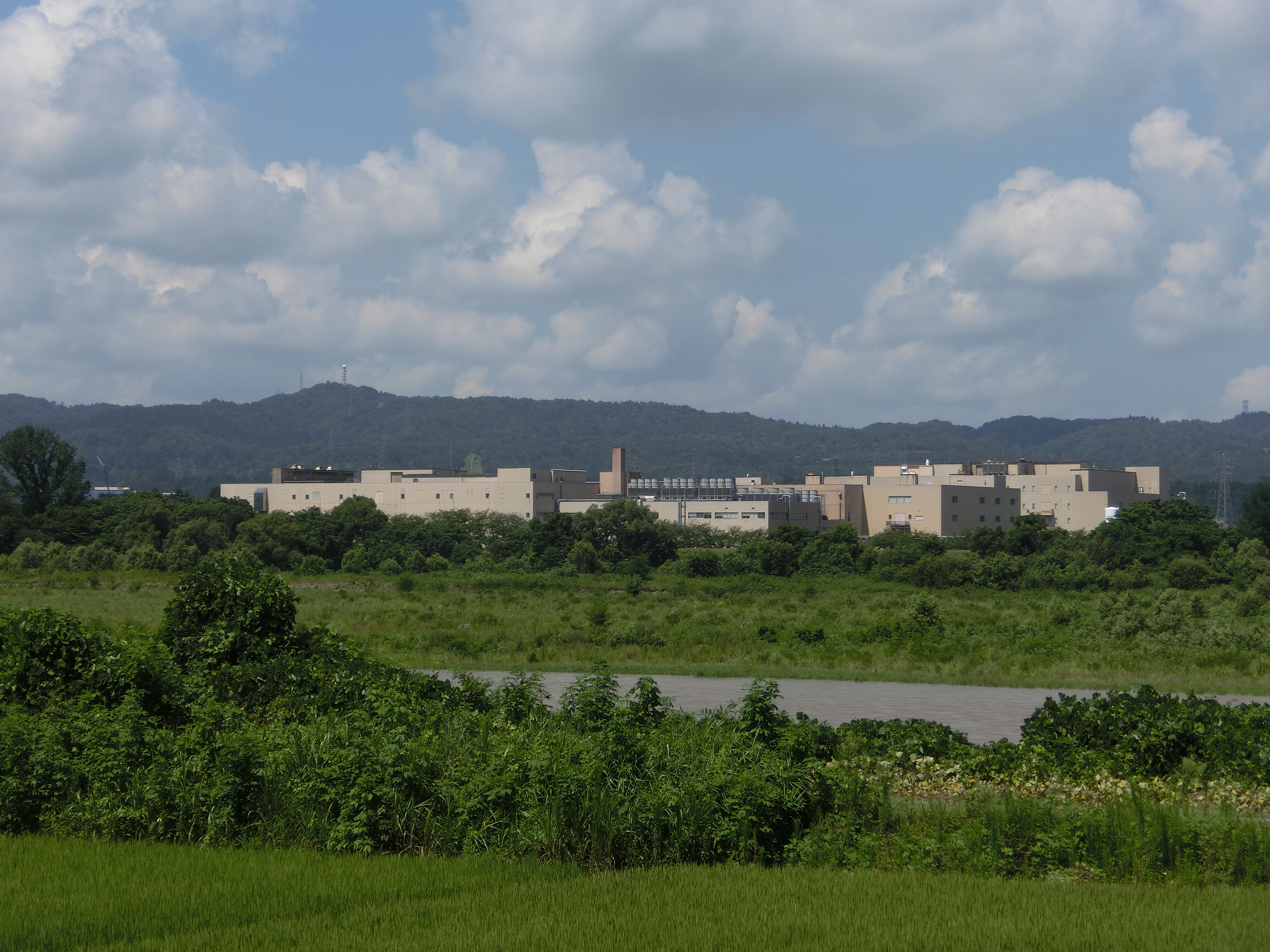 新潟県小千谷市大字薭生（信濃川東岸）より西岸のオン・セミコンダクター新潟（小千谷市千谷甲3000）社屋を撮影